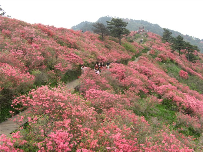 中国湖北省黄岡市麻城市・亀峰山にあるツツジ群生地